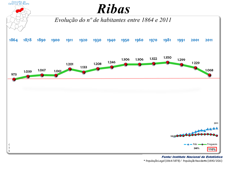 Censos 1864/2011